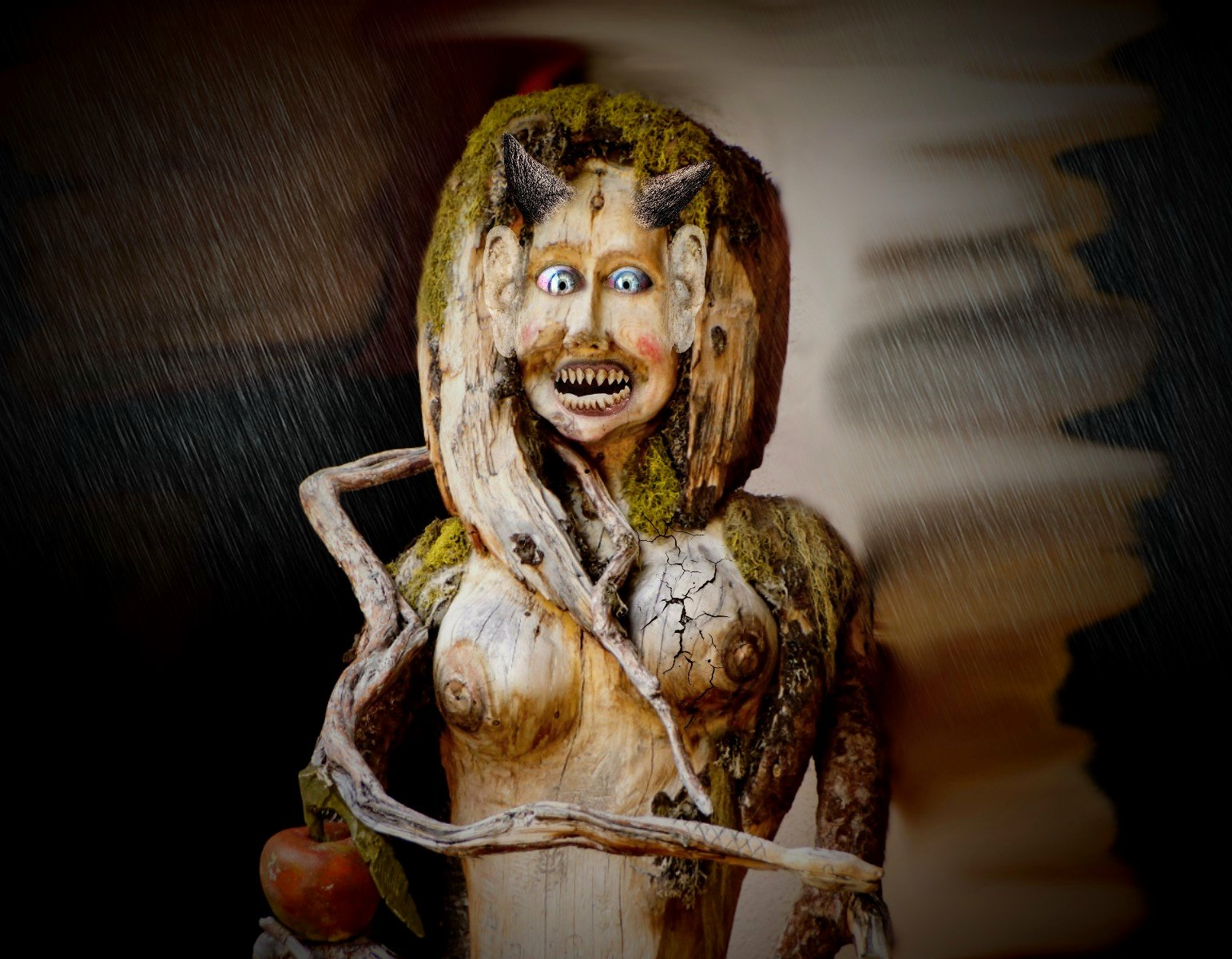 forest demon